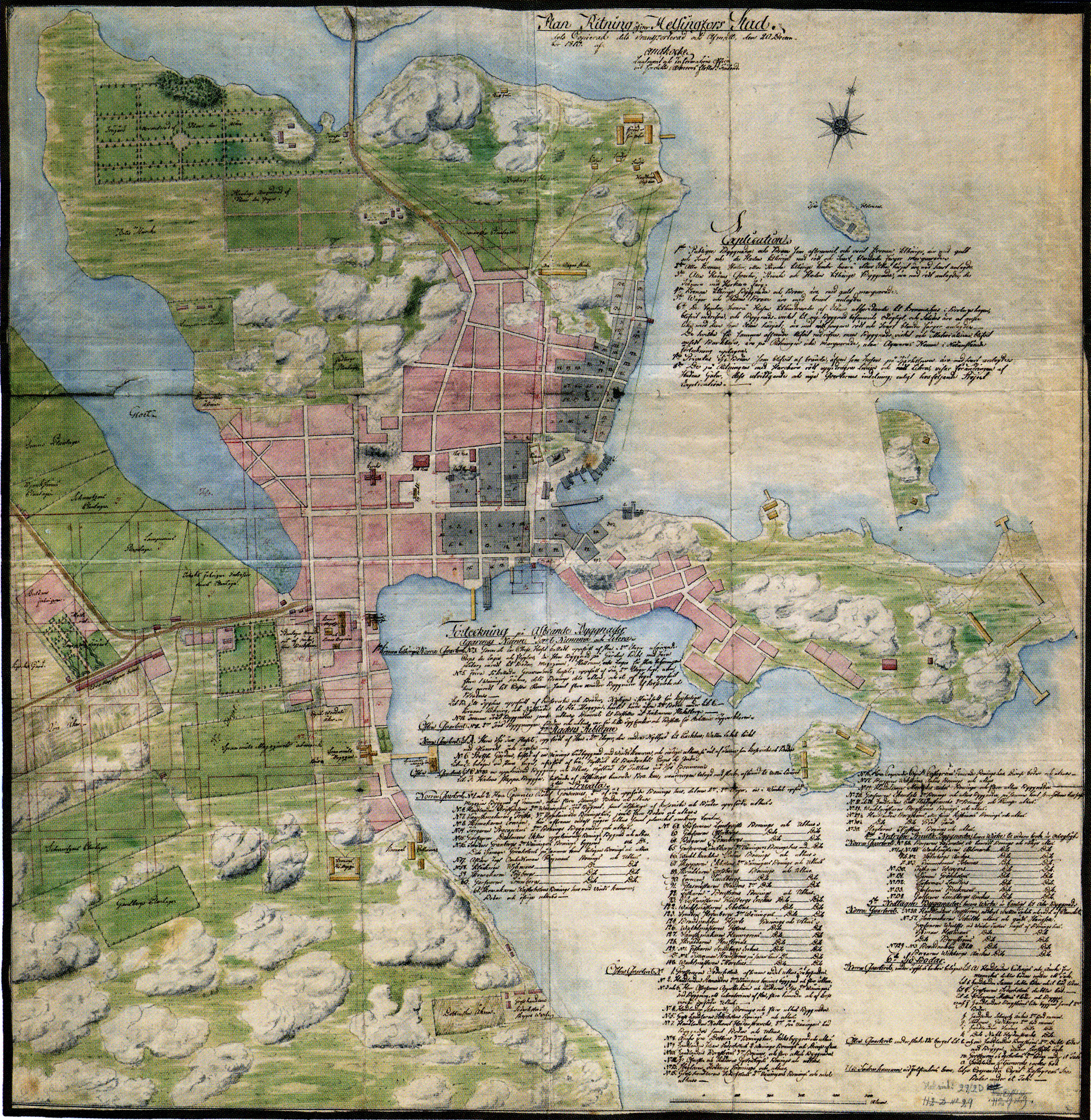 Anders Kocken suunnitelma Helsingin asemakaavaksi.